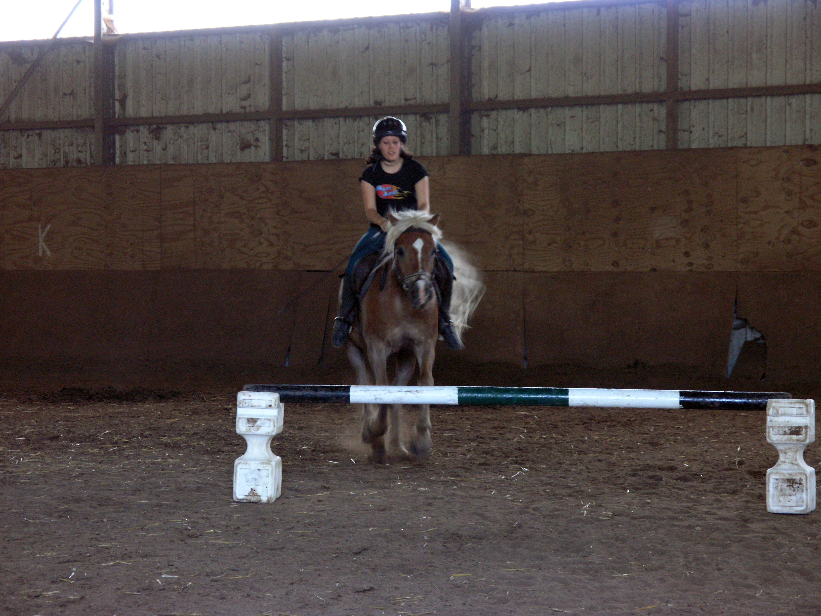 Riding